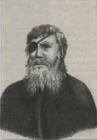 Wunder Jan, (1811-1889), revírník a včelař